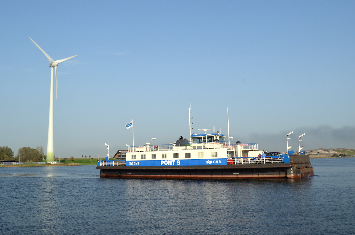 GVB Pont 9 op het Noordzeekanaal bij Buitenhuizen. Foto: Erik Swierstra.